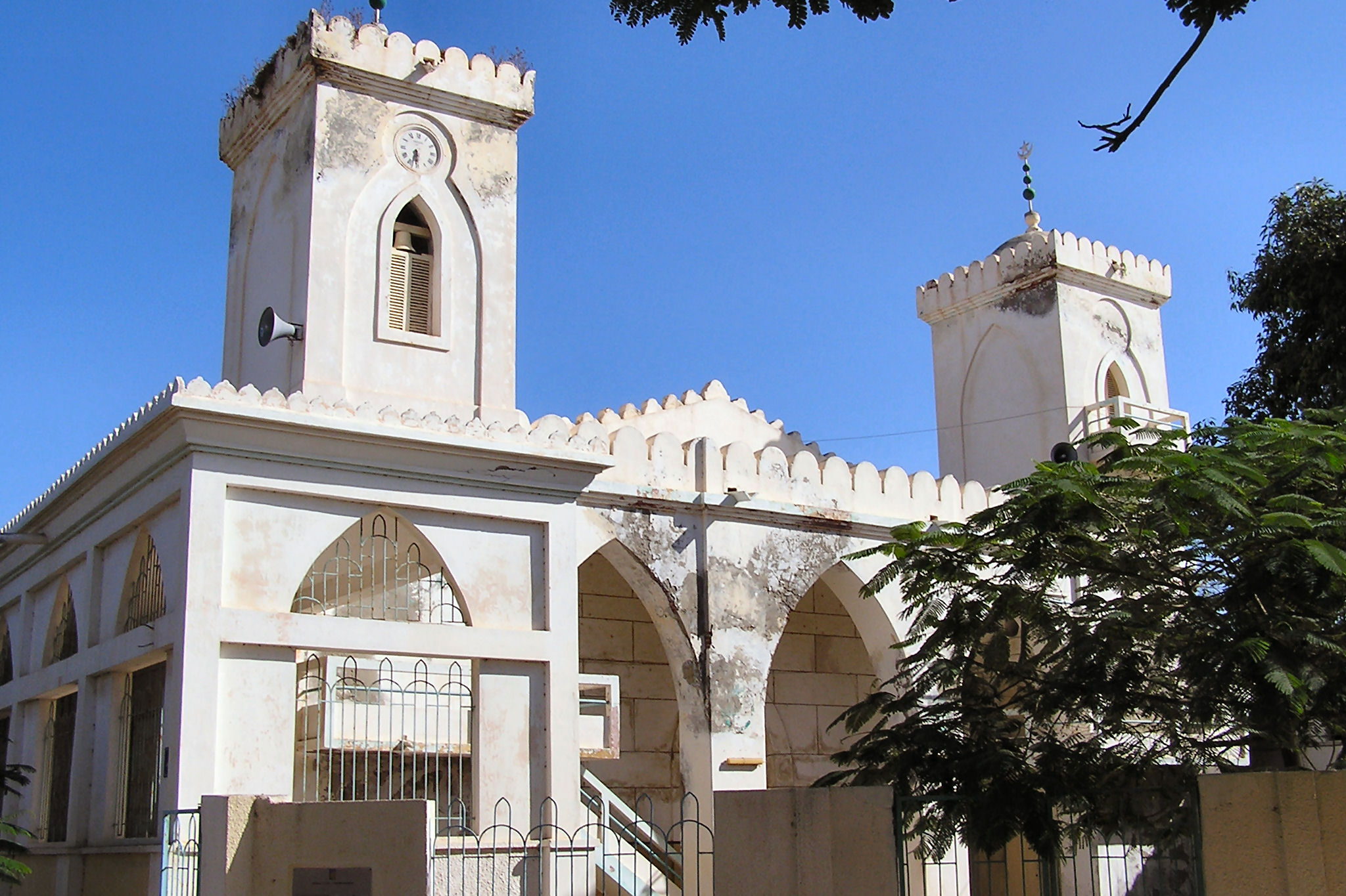 Saint Louis du Sénégal, grande mosquée sur l'ile historique